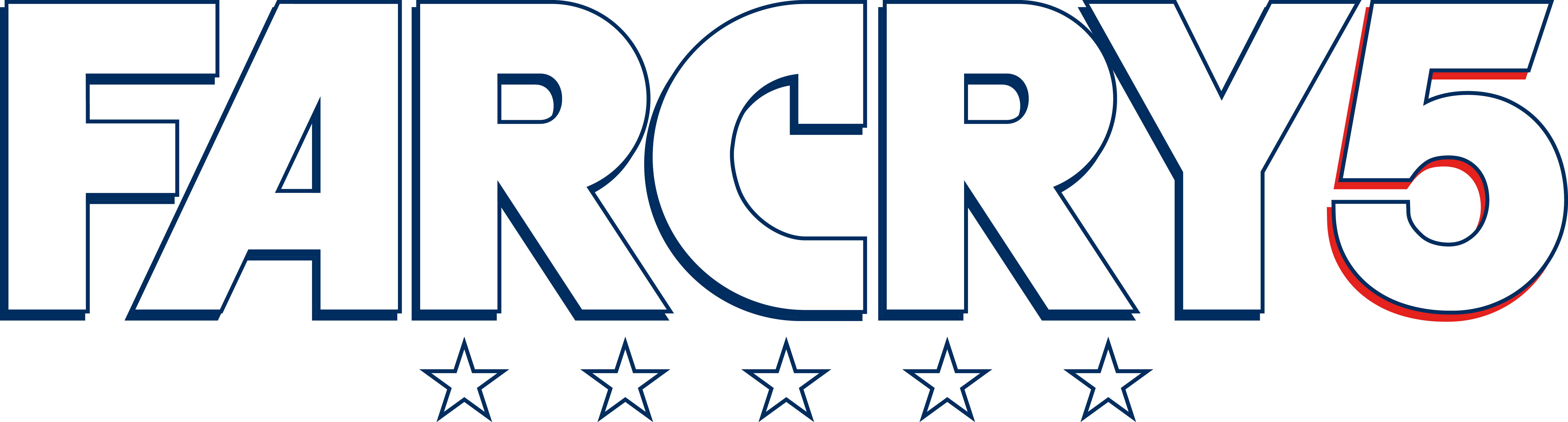 Logo Officiel Far Cry 5